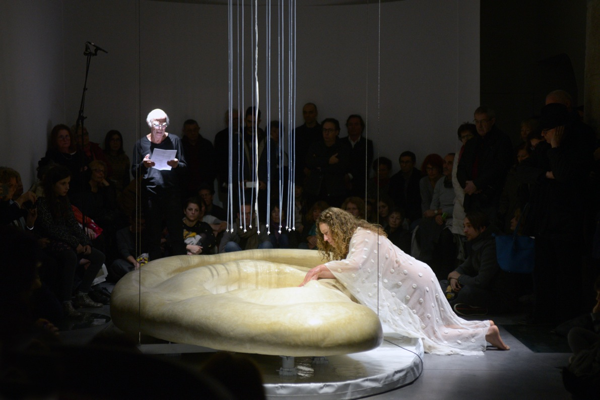 L'oreille qui tombe projet sonore et évolutif en collaboration avec Pascal Quignard Exposition du 12 février au 23 avril 2016 Espace d'Art Le Moulin du mardi au vendredi de 15h à 18h Samedi de 14h30 à 18h30 et le matin sur rendez-vous Espace d'Art Le Moulin 8, avenue Aristide Briand - 83160 La Valette-du-Var